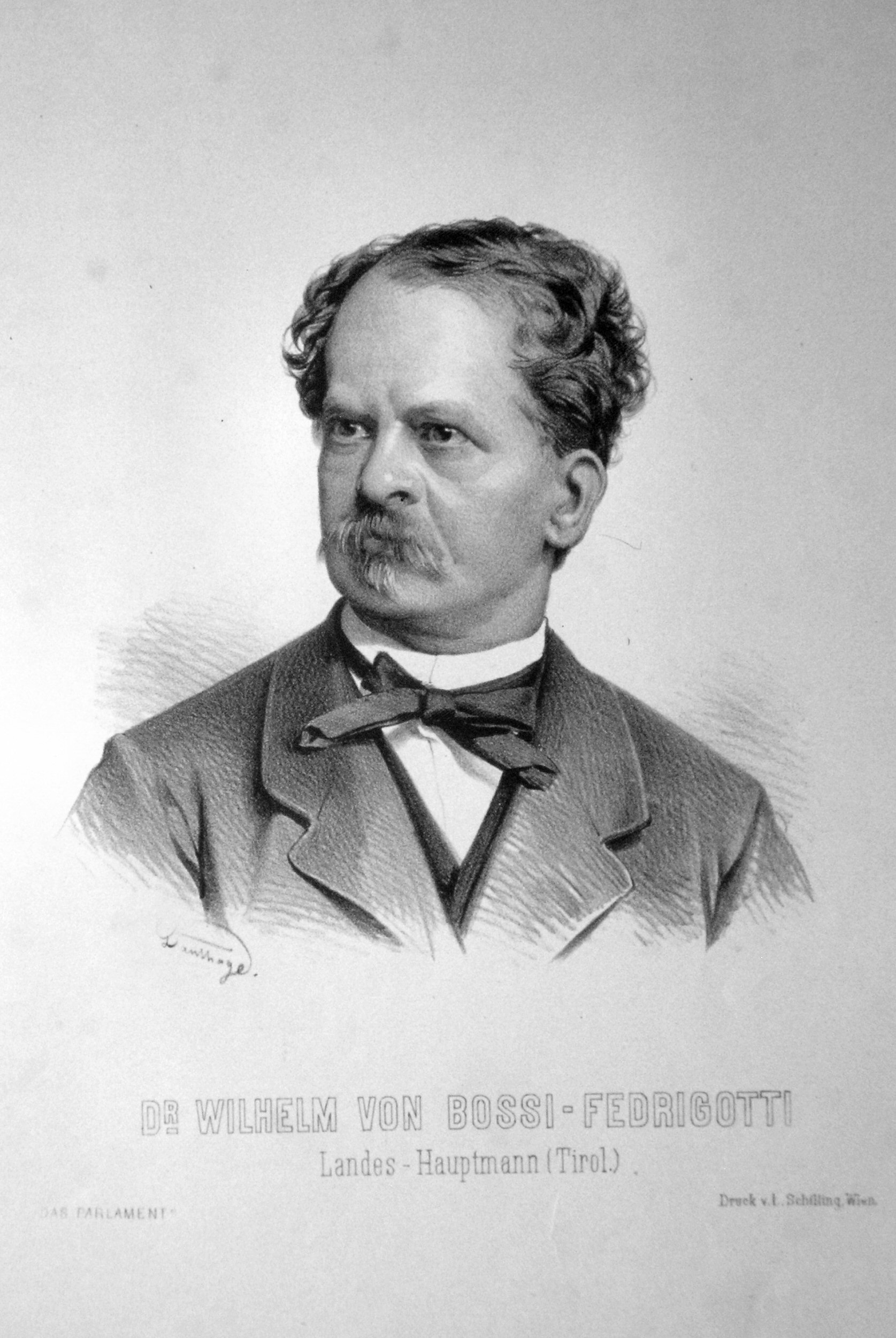 Wilhelm von Bossi-Fedrigotti (1823-1905), Landeshauptmann von Tirol, Dr. jur., k. k. Hofrat, Abgeordneter zum Reichsrat für Tirol. Lithographie von Adolf Dauthage, ca. 1880